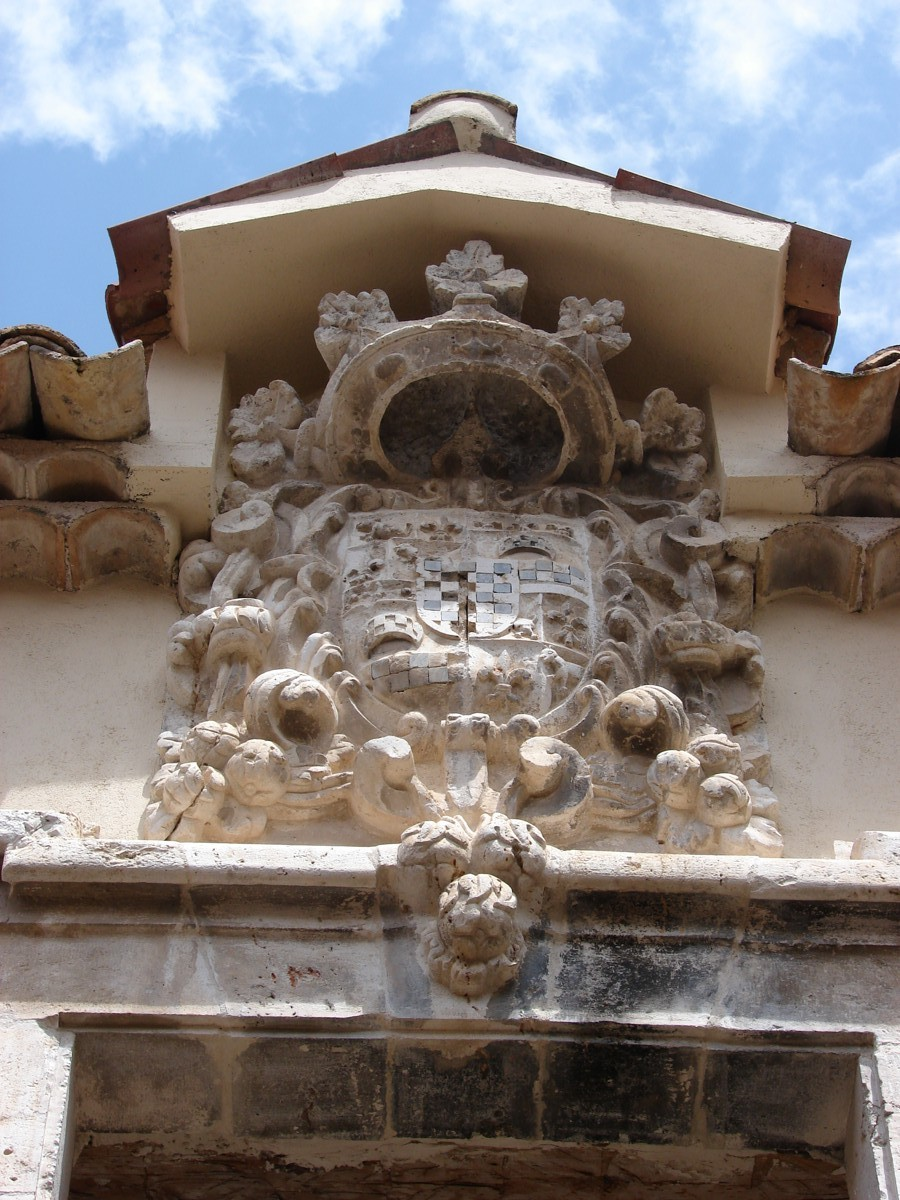 Escudo del Palacio de los Goyeneche (Illana - Guadalajara)